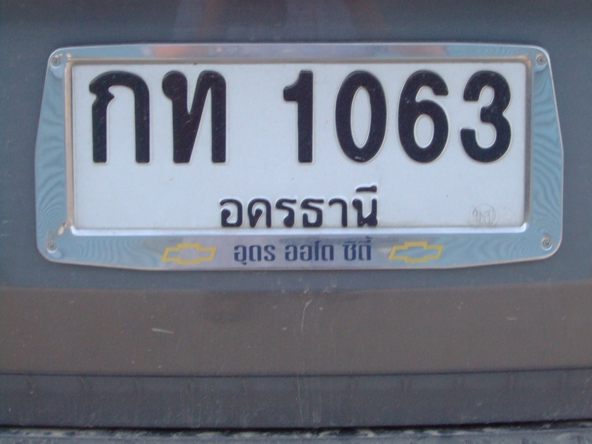 Foto propria - Novembre 2009